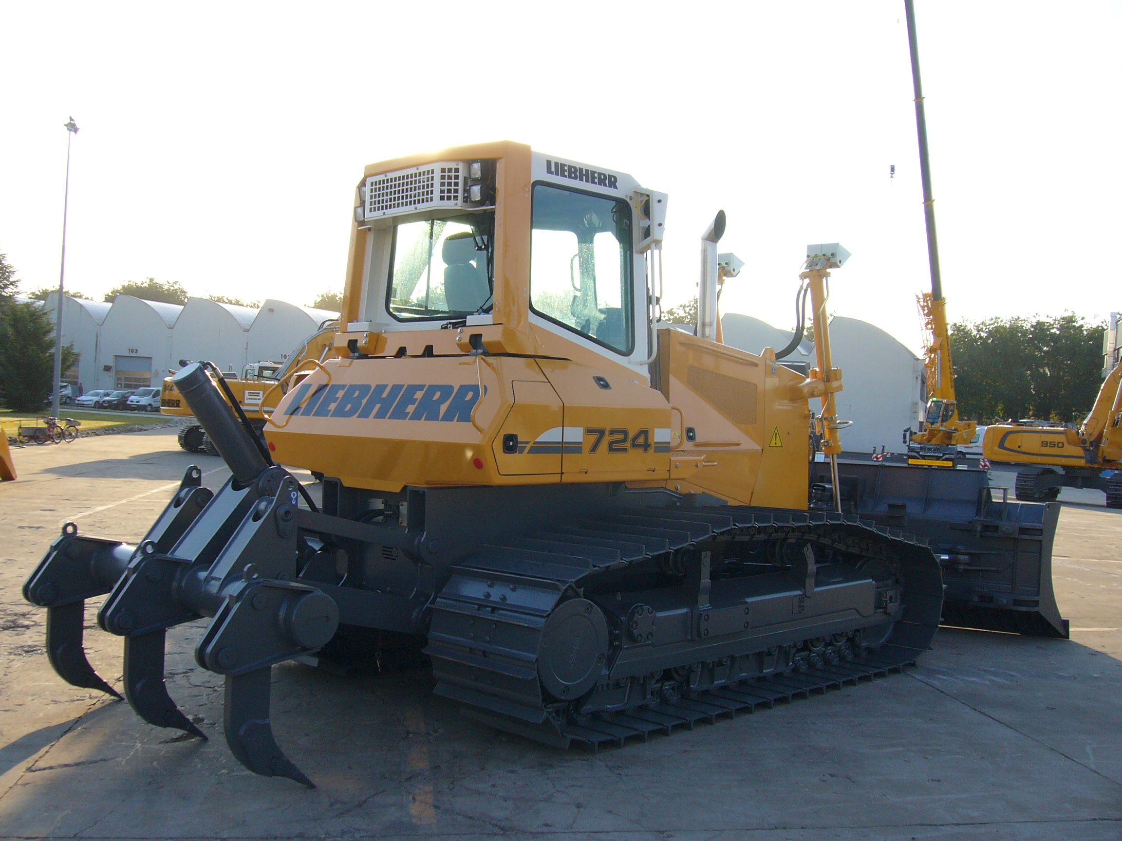 liebherr 724 Bouteur Bulldozer